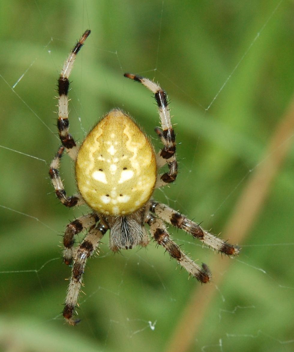 Araneus quadratus, female